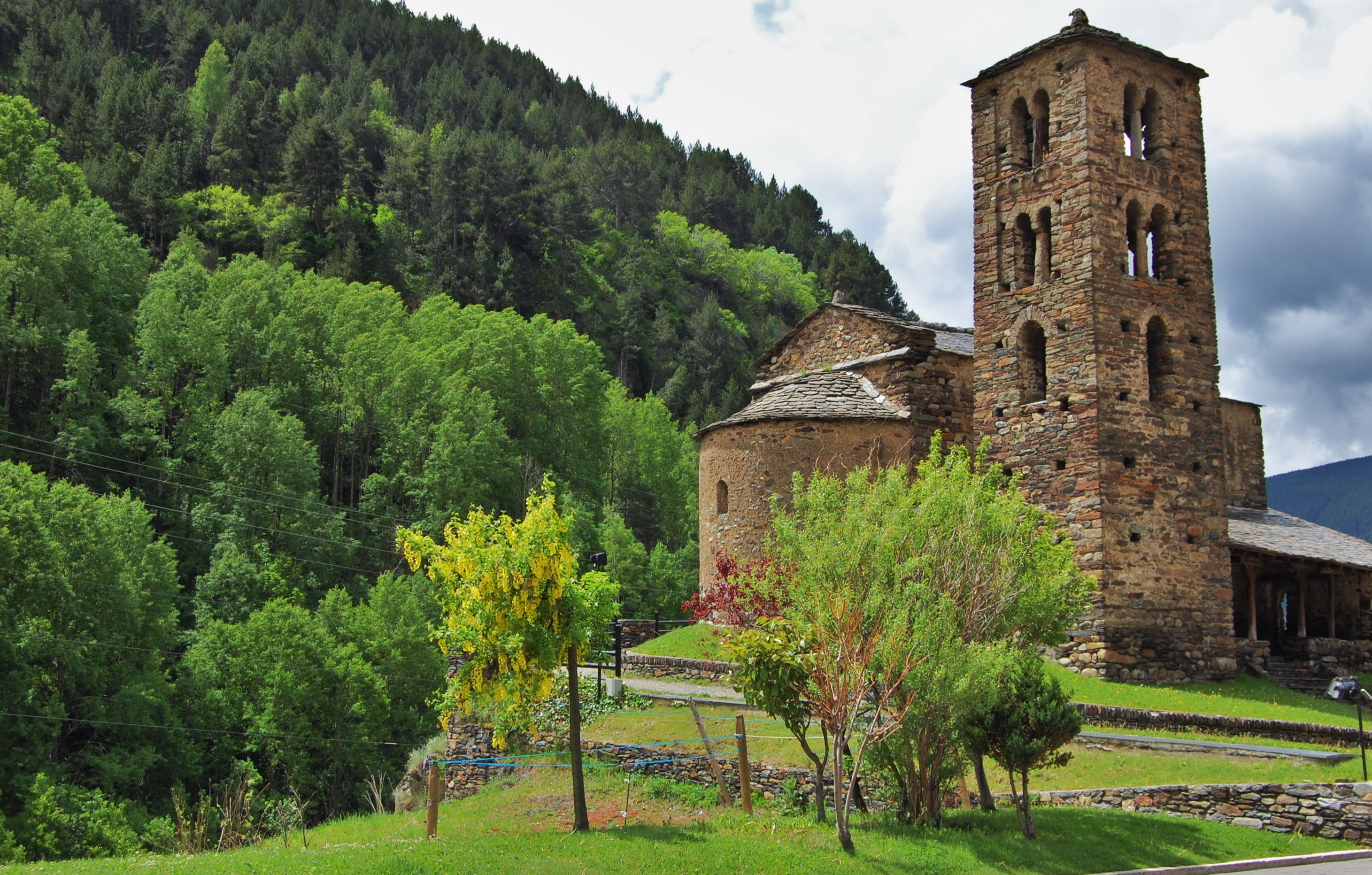 Església de Sant Joan de Caselles